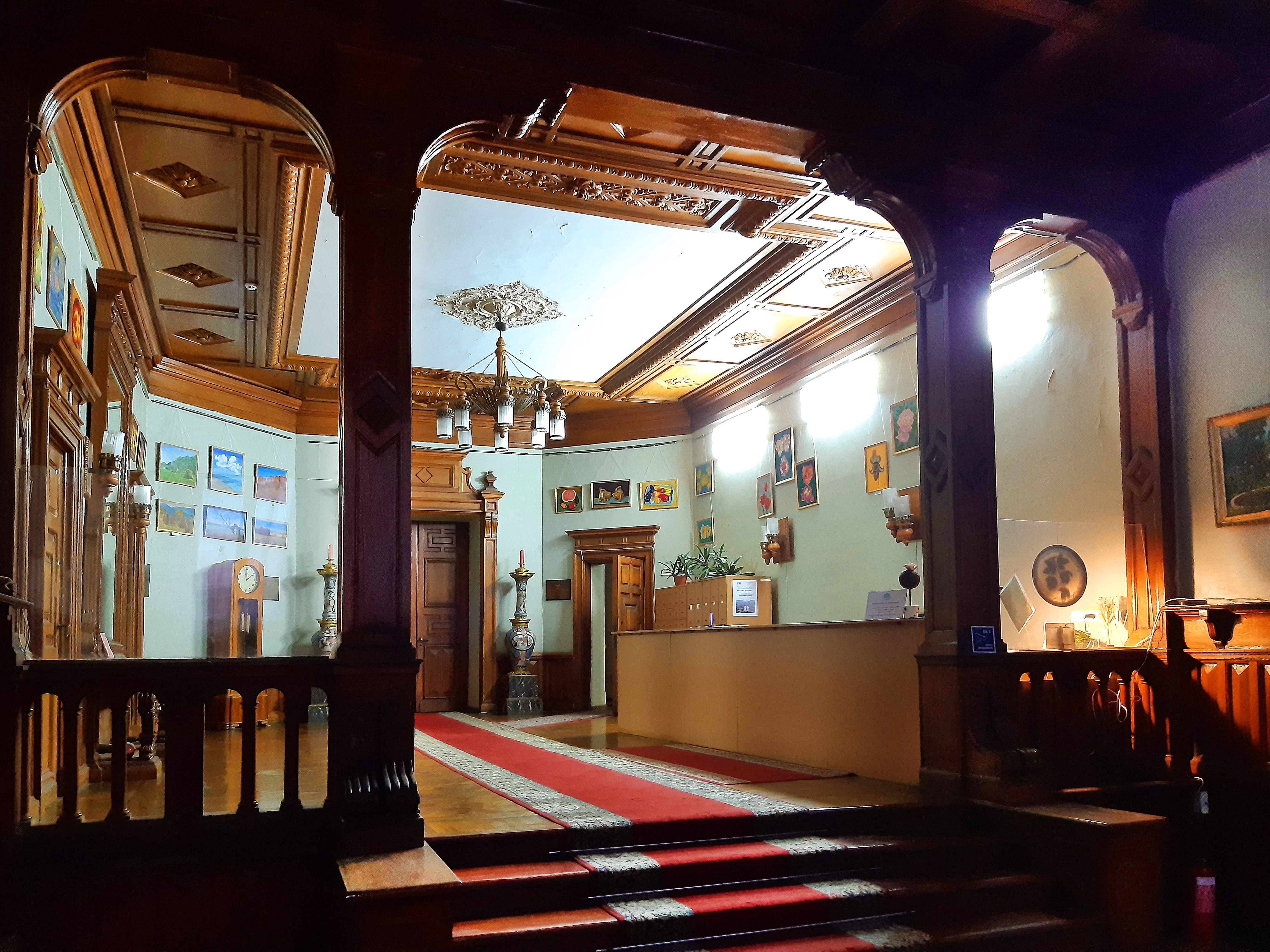 Інтер'єр. Особняк Терещенка (Республіканська медична бібліотека), Київ, вул. Л. Толстого, 07/2